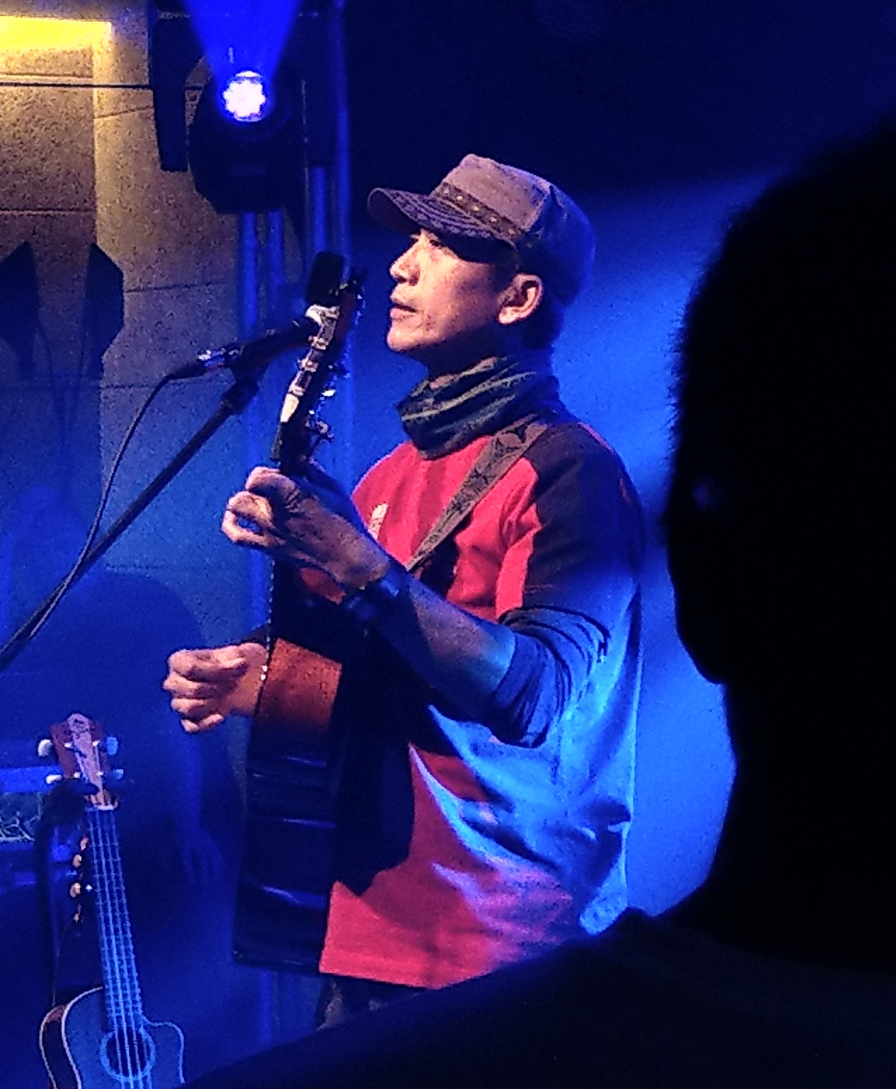 陳建年於原新竹風城願景館演唱